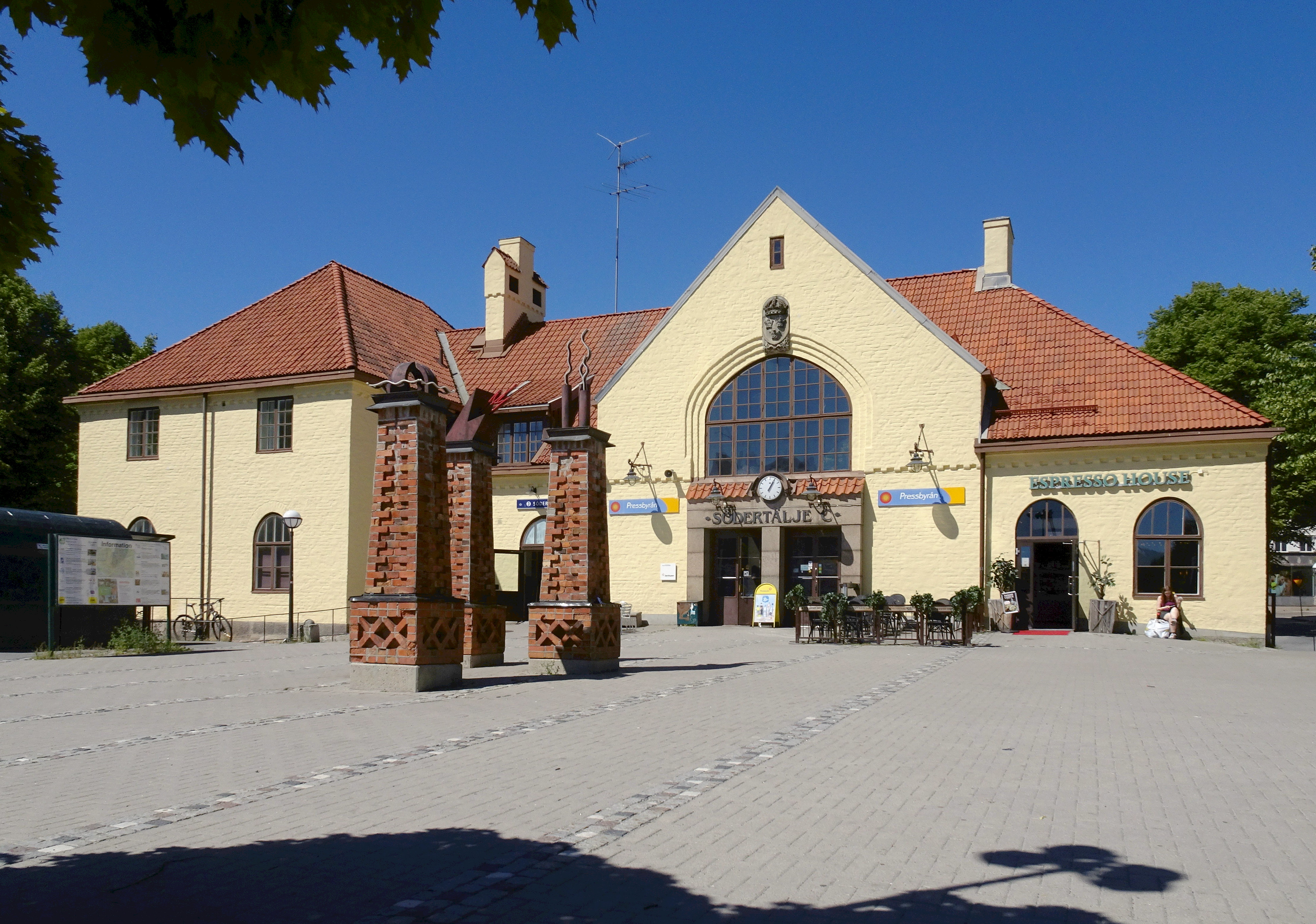 Södertälje stationshus byggt 1916-1918 efterritningar av arkitekt Folke Zettervall